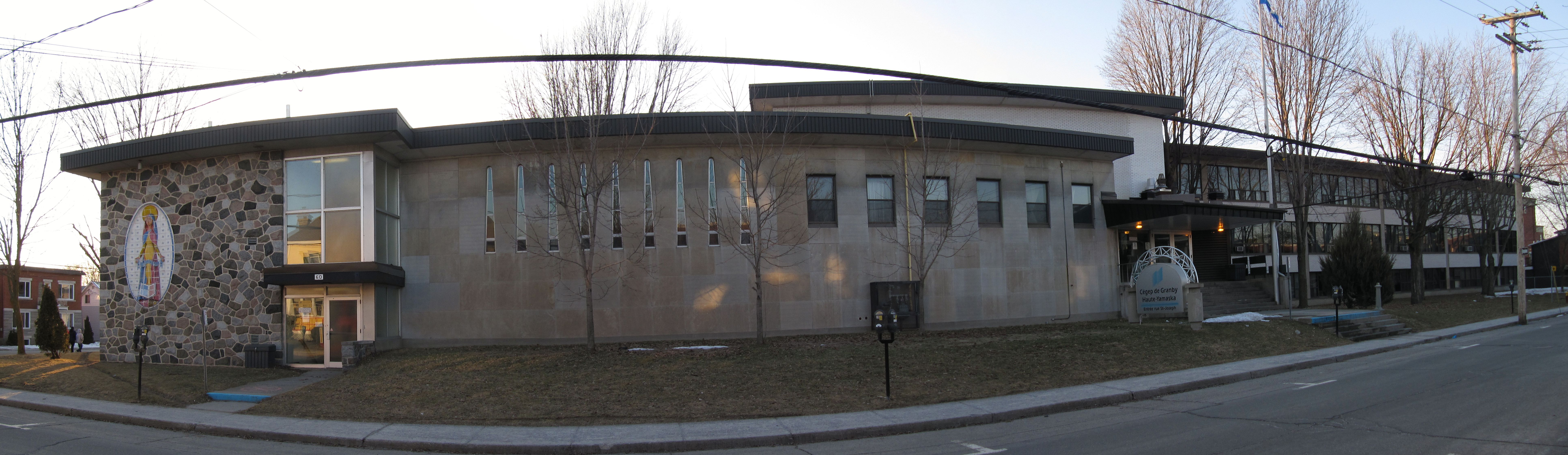 Cégep de Granby Haute-Yamaska - Depuis la rue Saint-Joseph